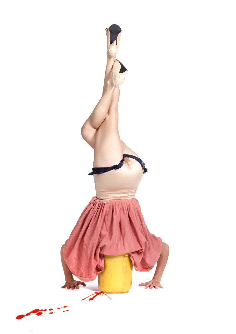 לוגו העצב של השכן עמוק יותר (2011). תיאטרון חזותי, במאית וכוריאוגרפית עמנואלה עמיחי